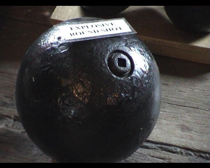 Das Bild zeigt eine Granate aus dem Segelkriegsschiffzeitalter